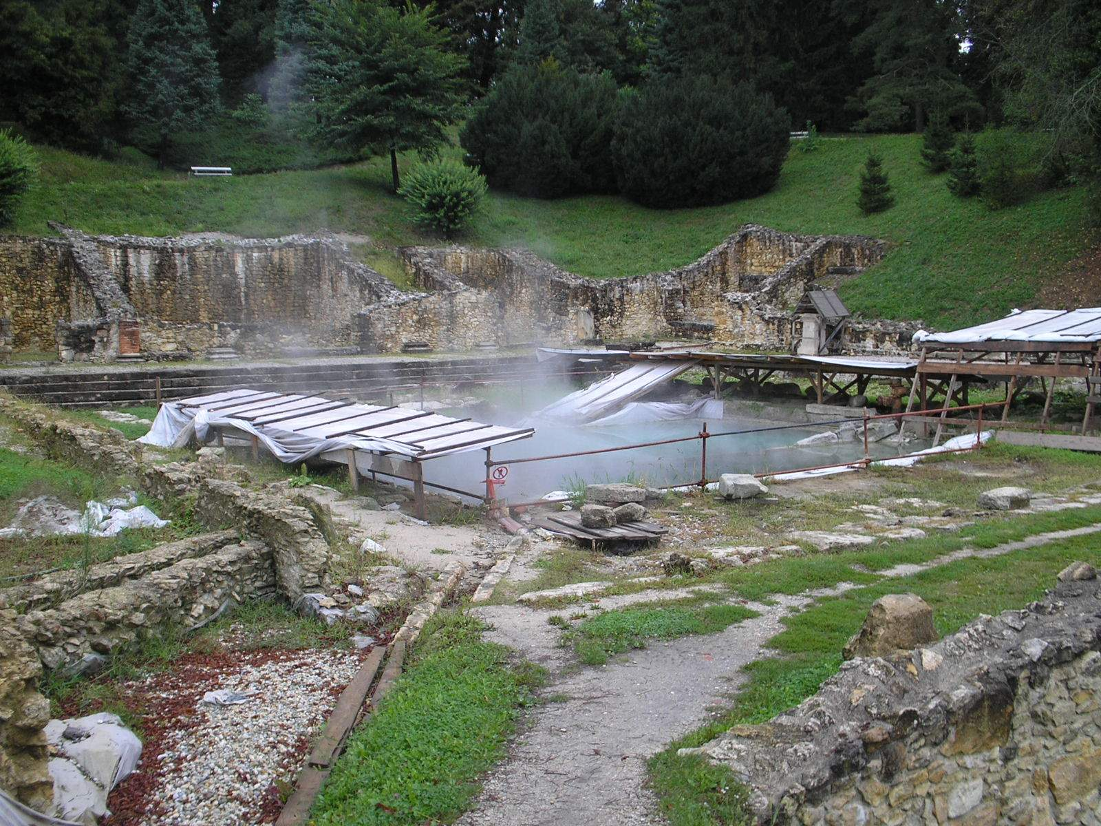 Ostaci rimskih termi u Varaždinskim Toplicama, Hrvatska